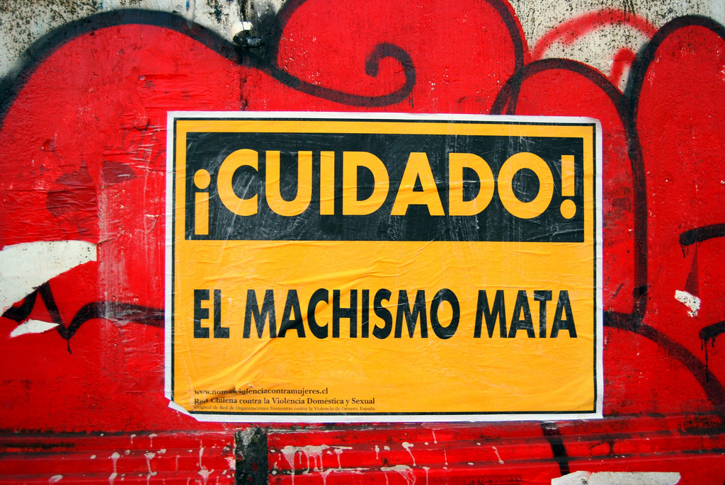 Violencia machista en las paredes